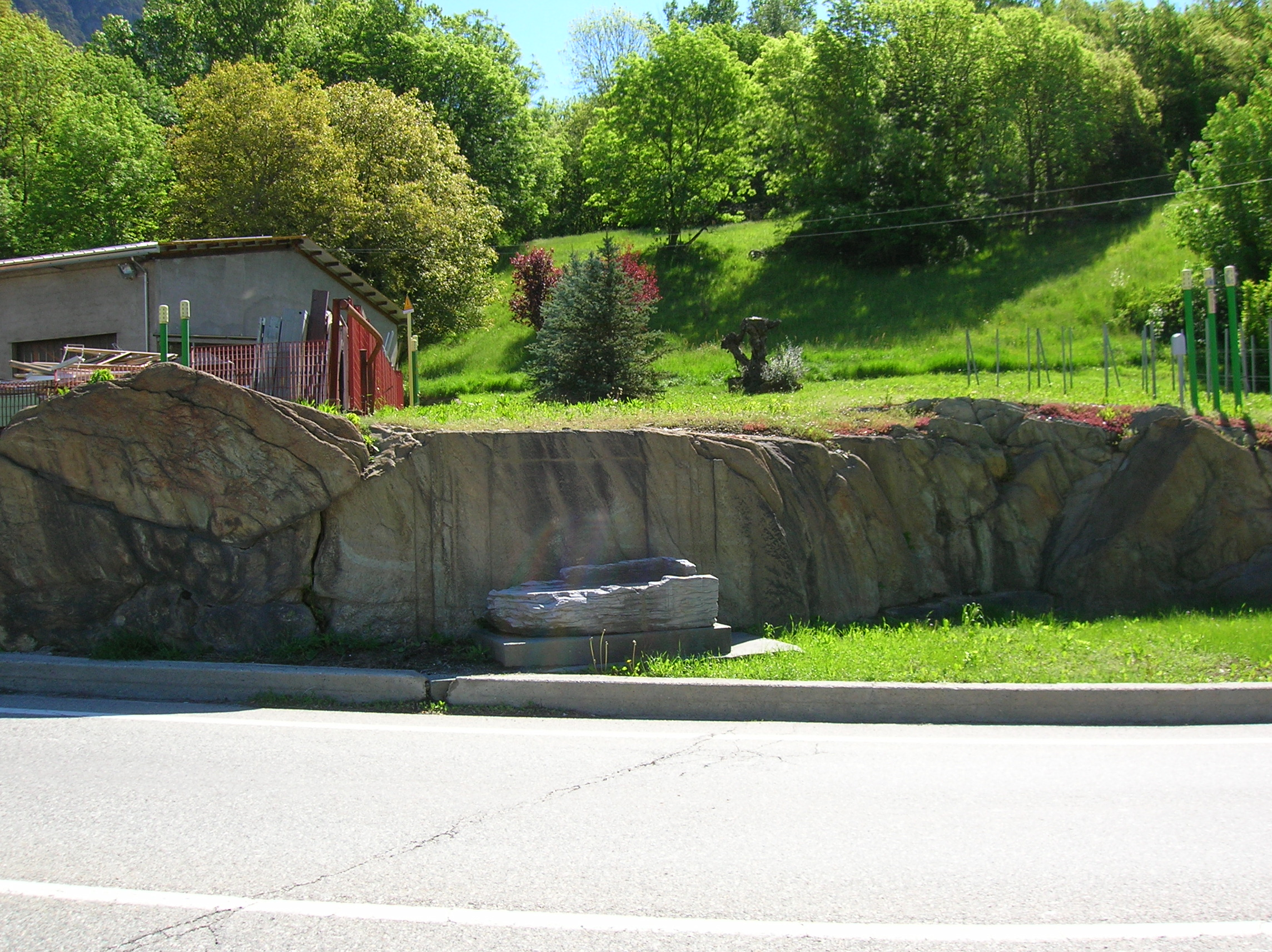 Tratto di via delle gallie e tomba romana lungo la SS 26. Montjovet, Valle d'Aosta, Italia.